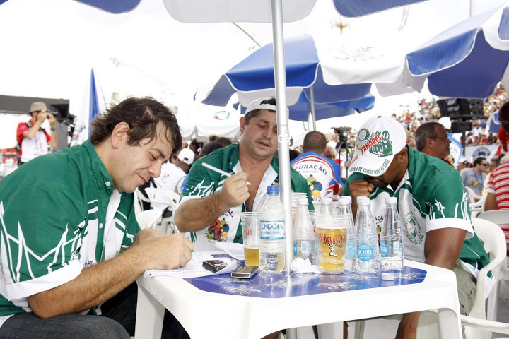 Carnaval São Paulo 2010. Apuração das escolas de samba do Grupo Especial, hoje, no sambódromo do Anhembi em São Paulo, SP. Na Foto: mesa com membros da Mancha Verde. Fotógrafo: Léo Pinheiro.